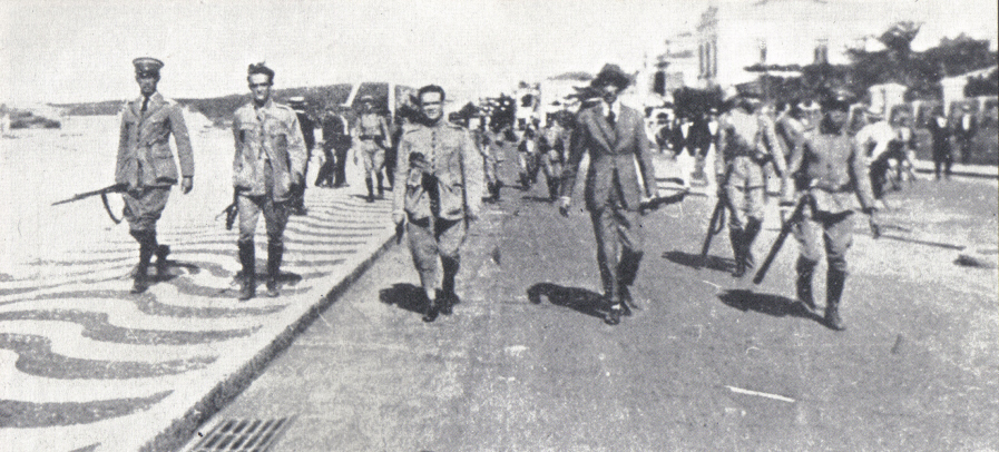 Revolta dos 18 do Forte de Copacabana: da esquerda para direita, tenentes Eduardo Gomes, Siqueira Campos, Nílton Prado e o civil Otávio Correia